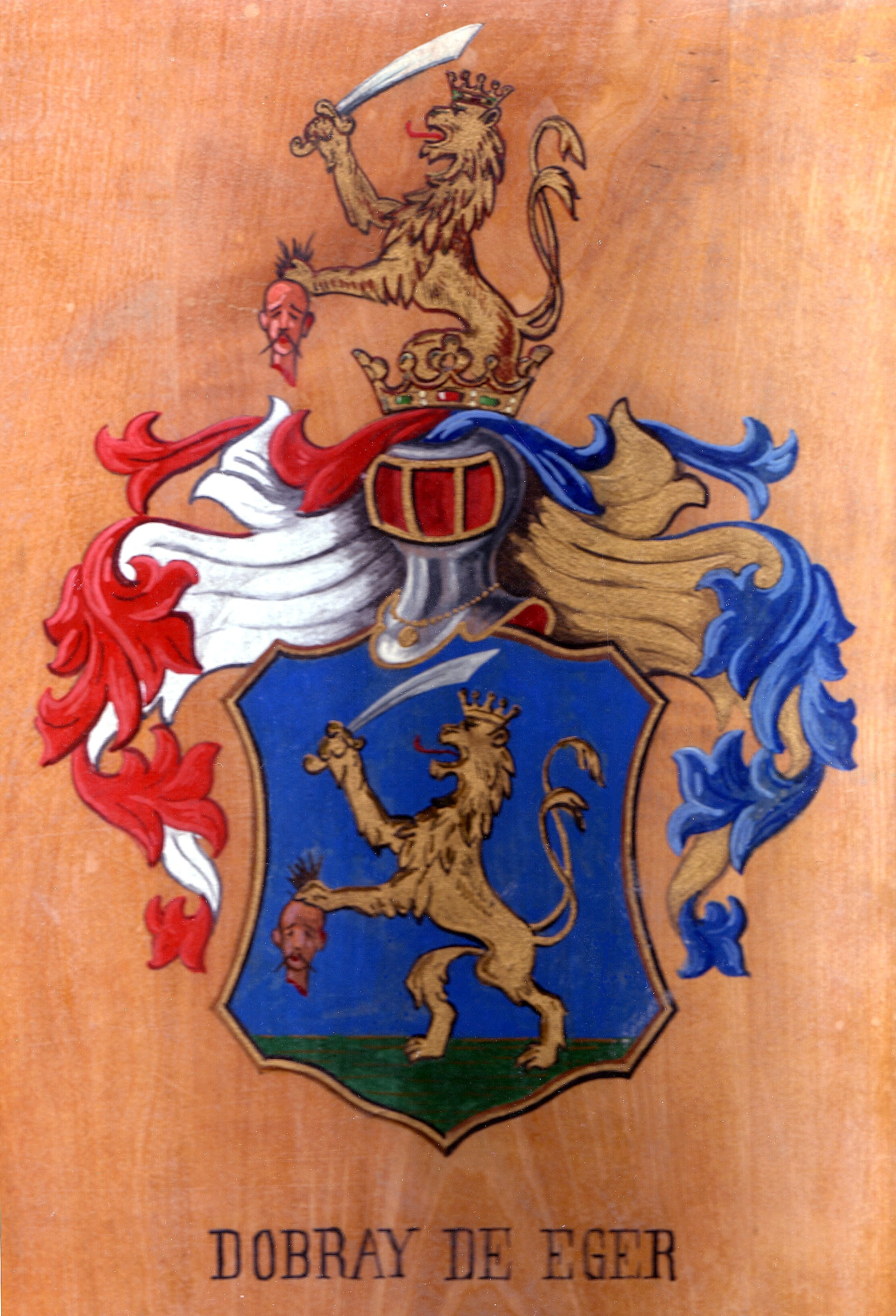 Wappen der Familie Dobray de Eger. Öl auf Holz, datiert auf 1882.